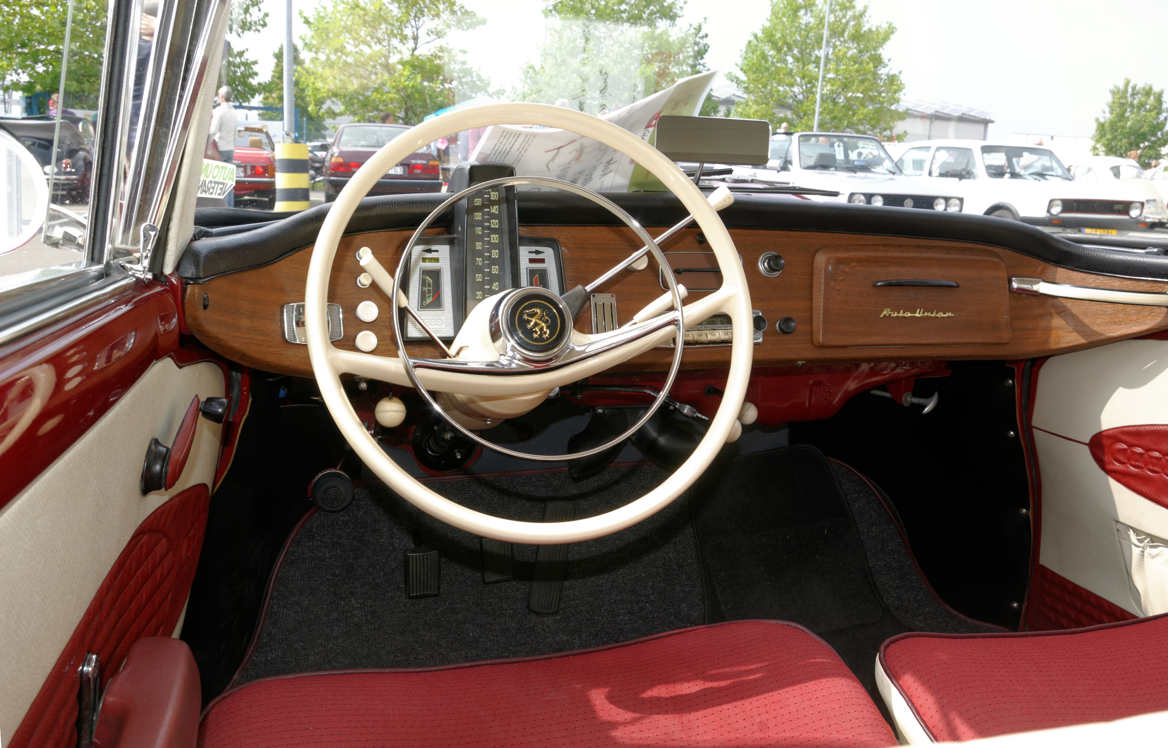 Auto Union 1000S Coupe de Luxe, Baujahr 1963, 1000 cm³, 3 Zyl., 50 PSBitburg Classic 2014 Bitburg Classic 2014 Das Nummernschild ist verfälscht